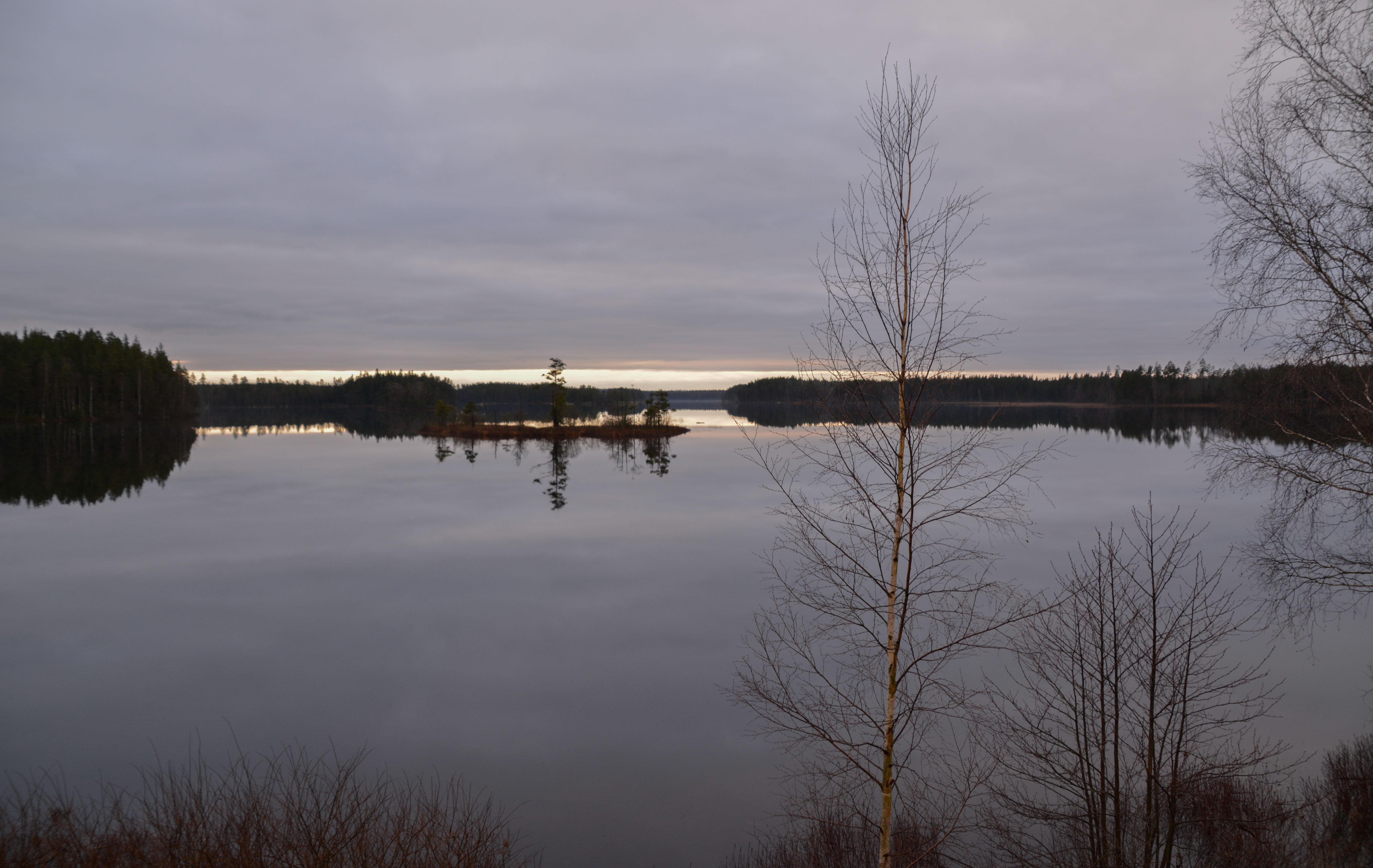 Sandsjön,Lenhovda socken, Uppvidinge kommun, Småland.